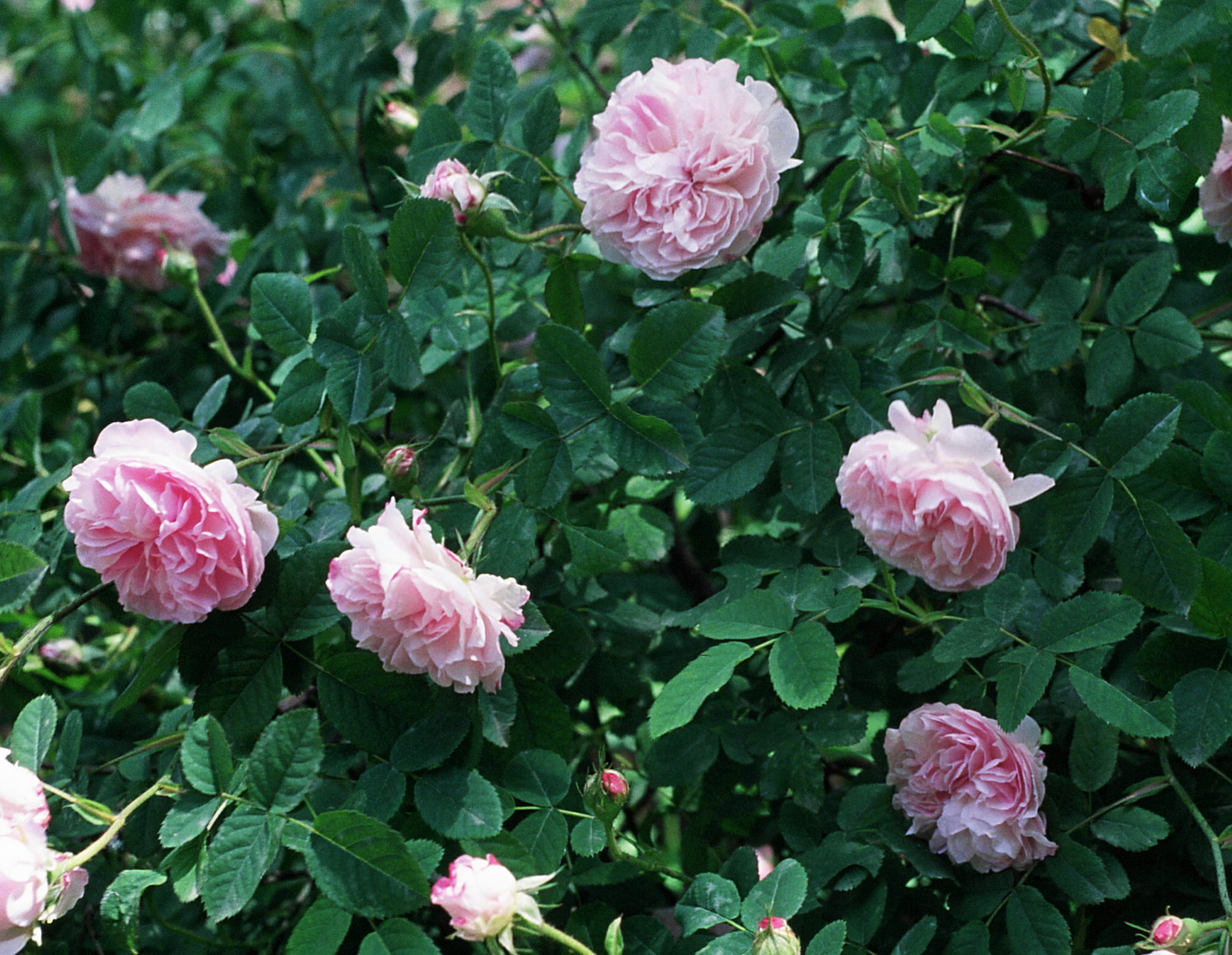 Rosa 'Quatre Saisons', gr. Damascenas, sect. Rosa. Real Jardín Botánico, Madrid